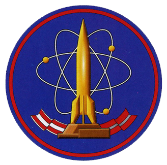 Нарукавная нашивка